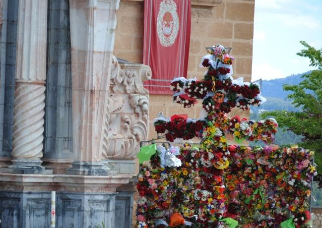 Cruz formada por las flores de los devotos